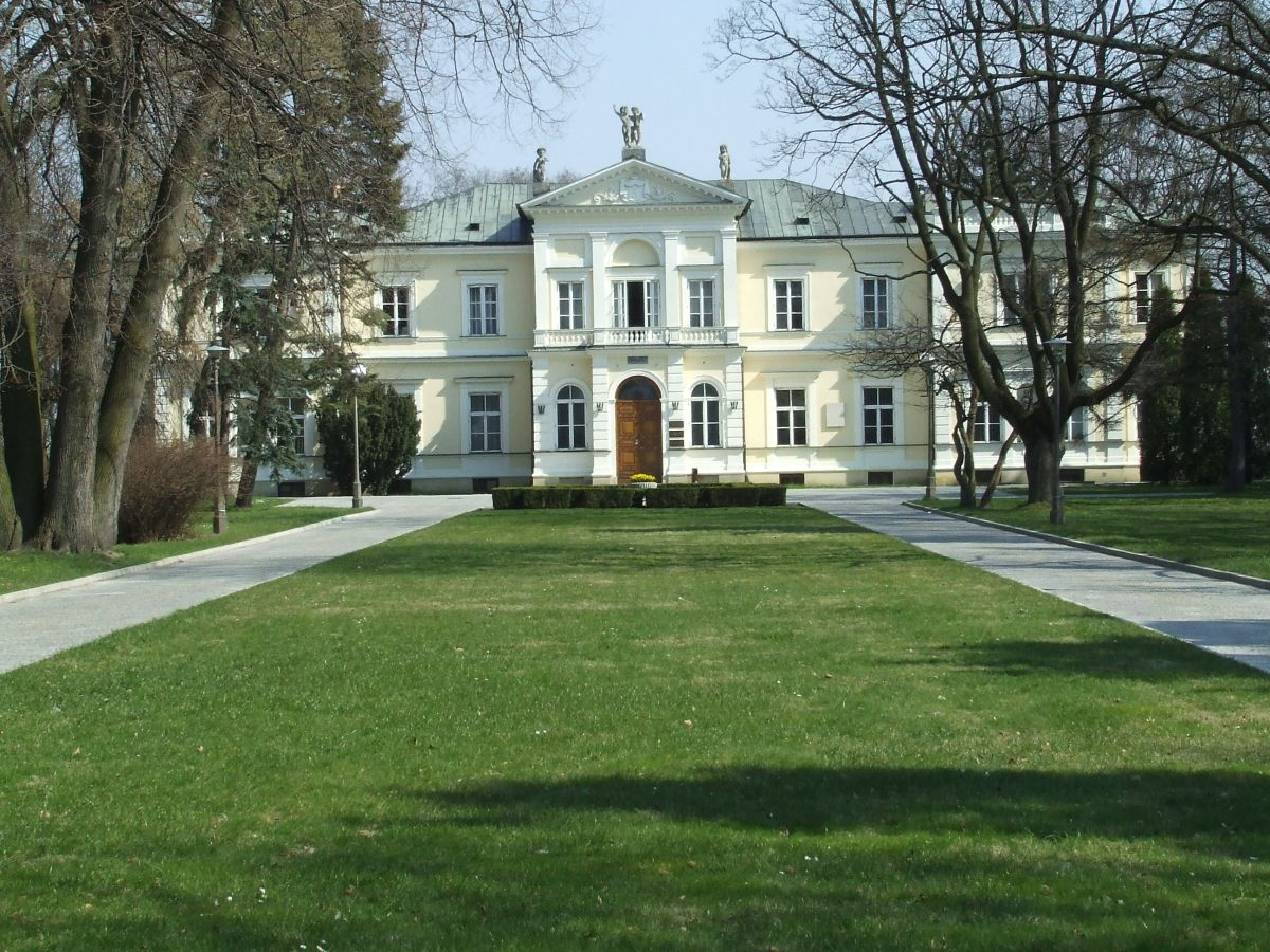 Pałac Juliana Ursyna Niemcewicza, obecnie rektorat SGGW